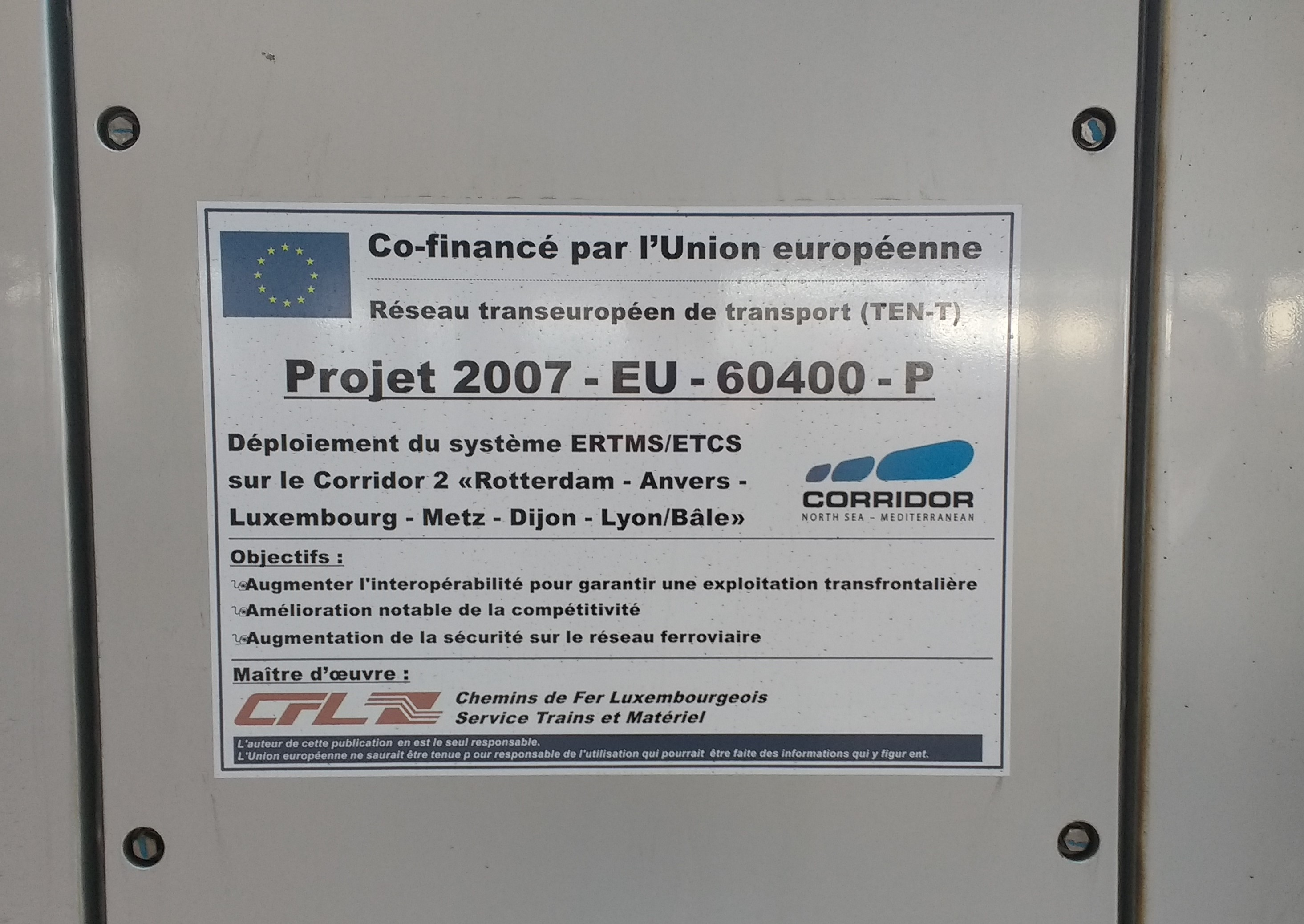 Système européen de surveillance du trafic ferroviaire sur TER Lux.